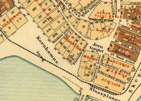 Del av Lundgrens Stockholmskarta från 1885 visande södra delen av Gamla stan